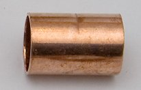 Kupferfitting Typ 5270: Muffe